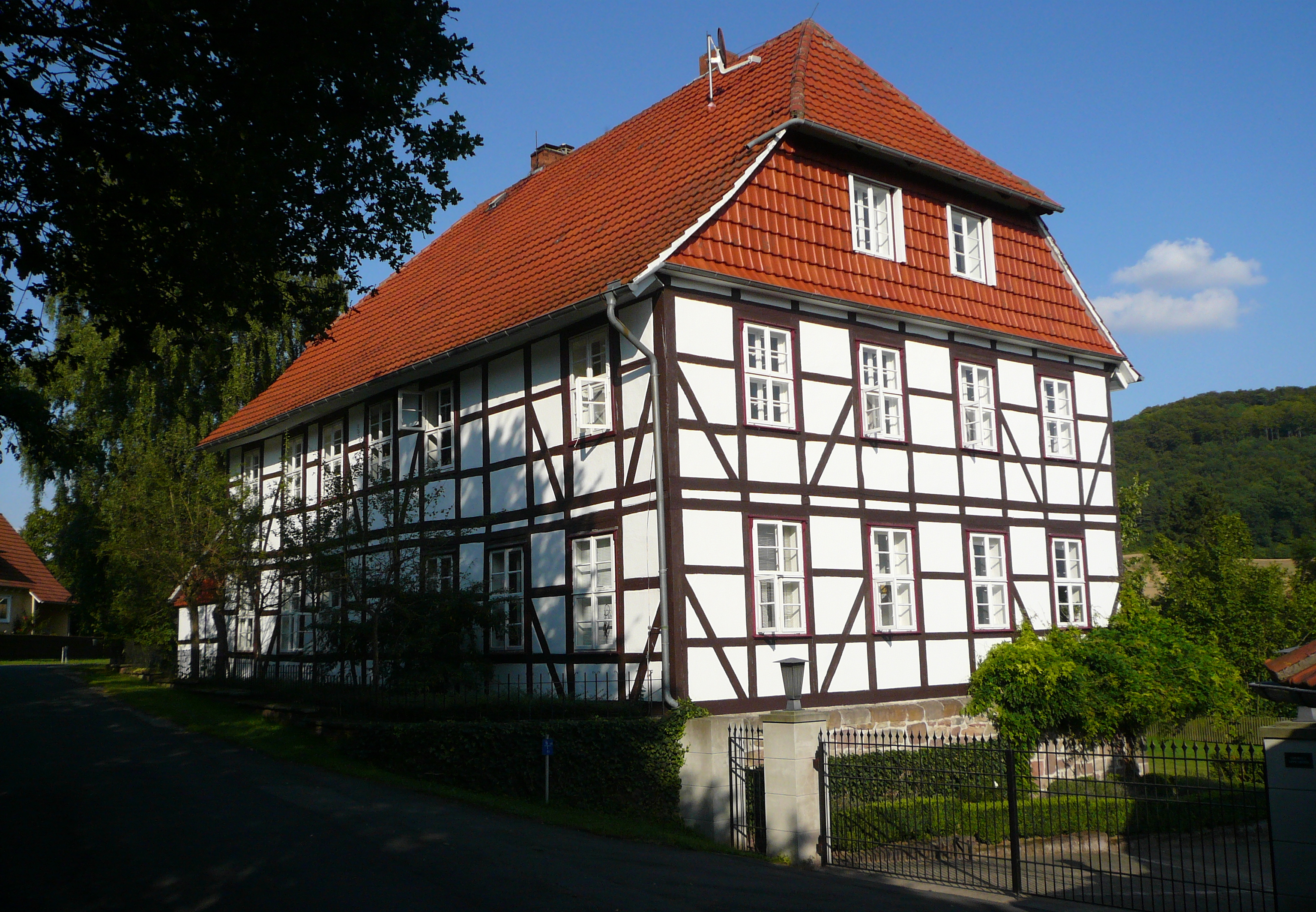 "Herrenhaus" des Oberguts Appenrode, Gemeinde Gleichen, Südniedersachsen. Erbaut in der zweiten Hälfte des 18. Jahrhunderts. Die Gutshöfe Appenrode dienten ursprünglich den Herren von Uslar-Gleichen zur Versorgung der Höhenburg Altengleichen.